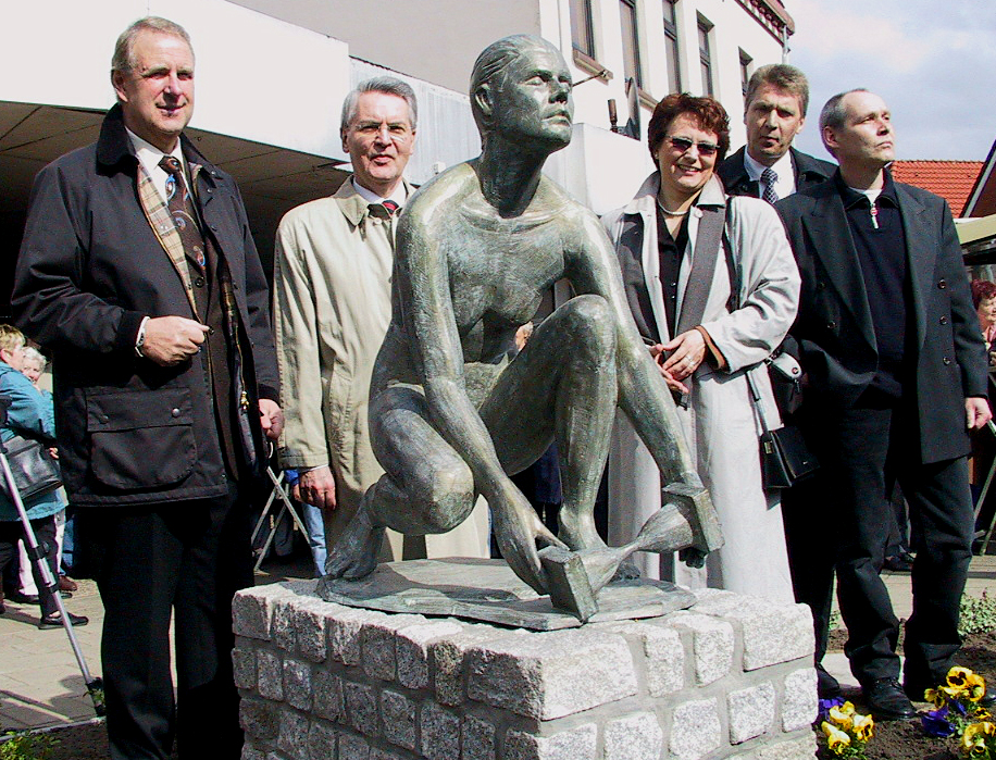 Die Bronze-Plastik "Skuld" von Bildhauer Carsten Eggers wurde 2005 anläßlich der 750-Jahr-Feier Horneburgs von Gemeinde-Vertretern in der Ortsmitte enthüllt